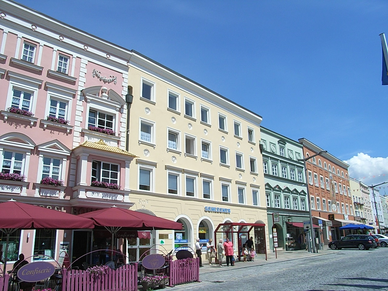 Wohnbauten in Pfarrkirchen